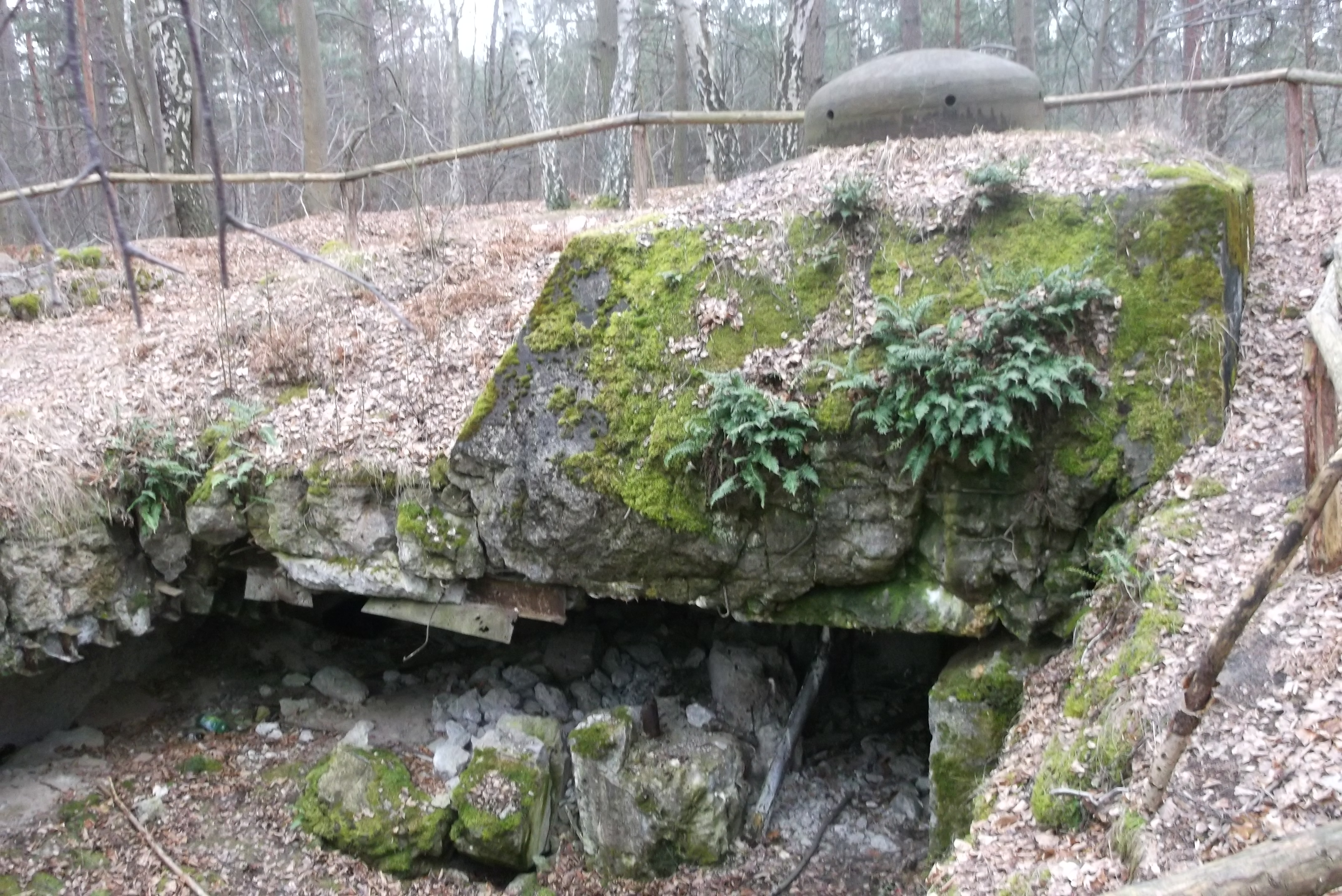 Trójkąt lidzbarski panzerwerk schron nr 1